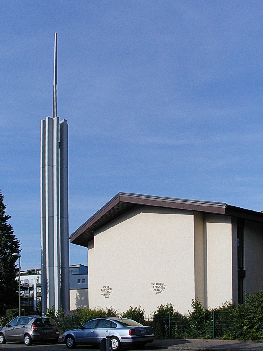 Die Kirche Jesu Christi der Heiligen der Letzten Tage in Weilimdorf